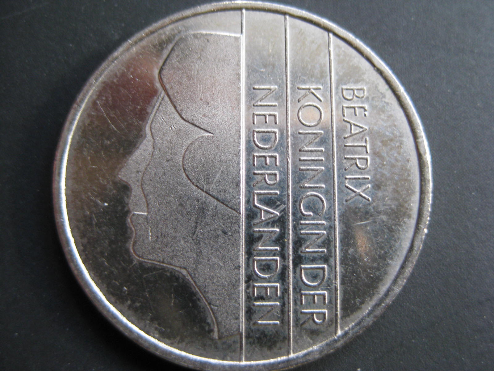 Nederlandse gulden 2000 beeltenis van Koningin Beatrix ontworpen door Bruno Ninaber van Eyben